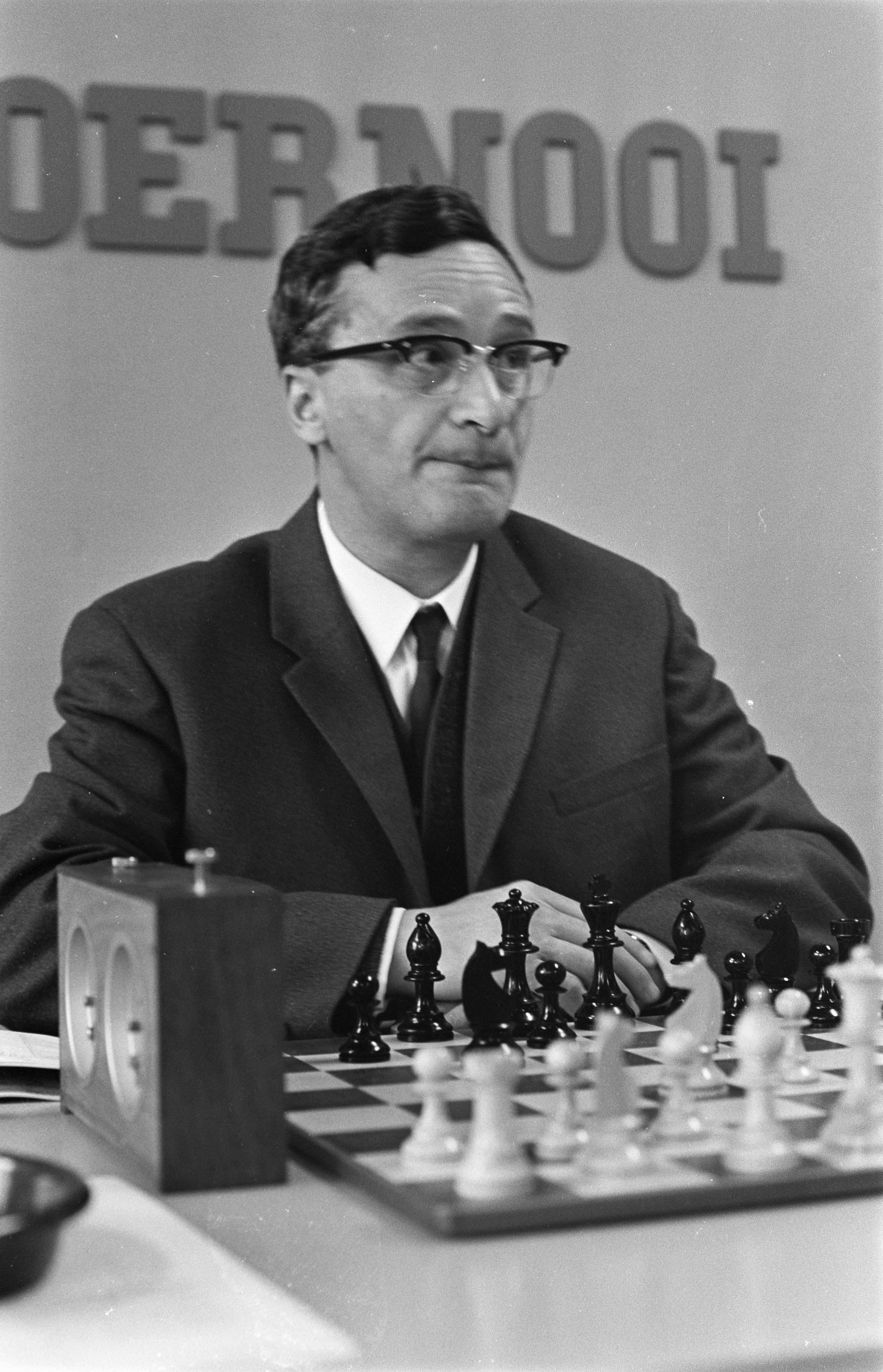 Collectie / Archief : Fotocollectie Anefo Reportage / Serie : [ onbekend ] Beschrijving : IBM-schaaktoernooi. Leonid Shamkovich (?) achter het bord Datum : 22 juli 1968 Trefwoorden : schaken Persoonsnaam : Donner, Jan Hein Instellingsnaam : IBM-Schaaktoernooi Fotograaf : Kroon, Ron / Anefo Auteursrechthebbende : Nationaal Archief Materiaalsoort : Negatief (zwart/wit) Nummer archiefinventaris : bekijk toegang 2.24.01.05 Bestanddeelnummer : 921-5280